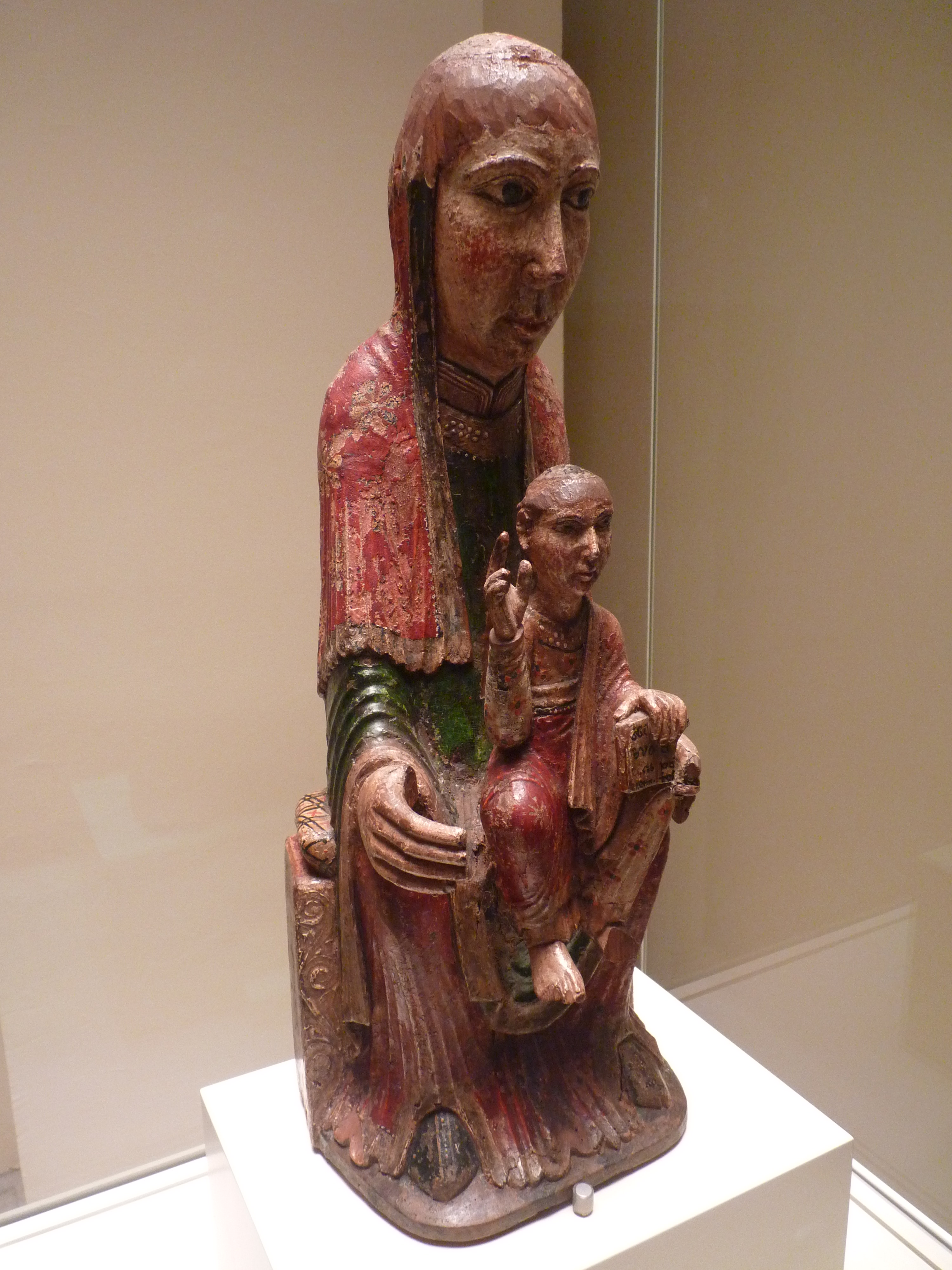 Mare de Déu de Ger. ANÒNIM. Segona meitat del segle XII